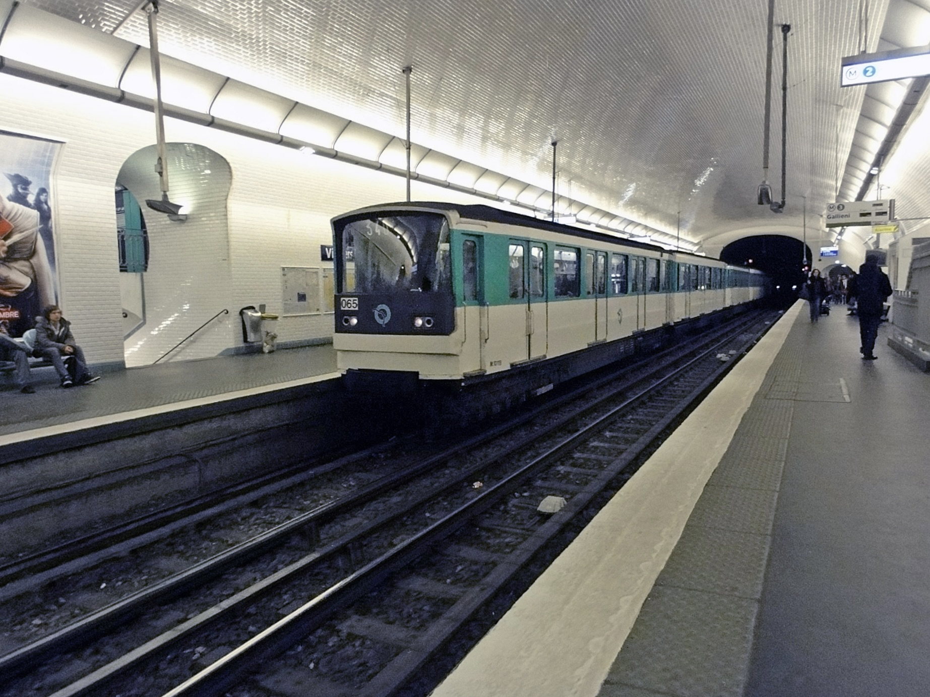 Station Villiers de la ligne 3 du métro de Paris, France.